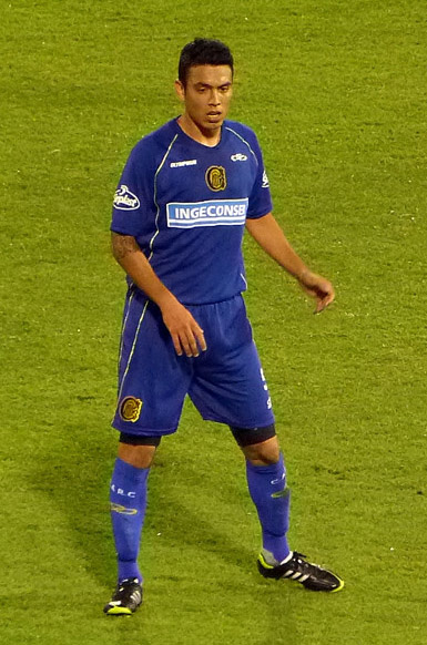 Nery Domínguez jugando para Rosario Central.